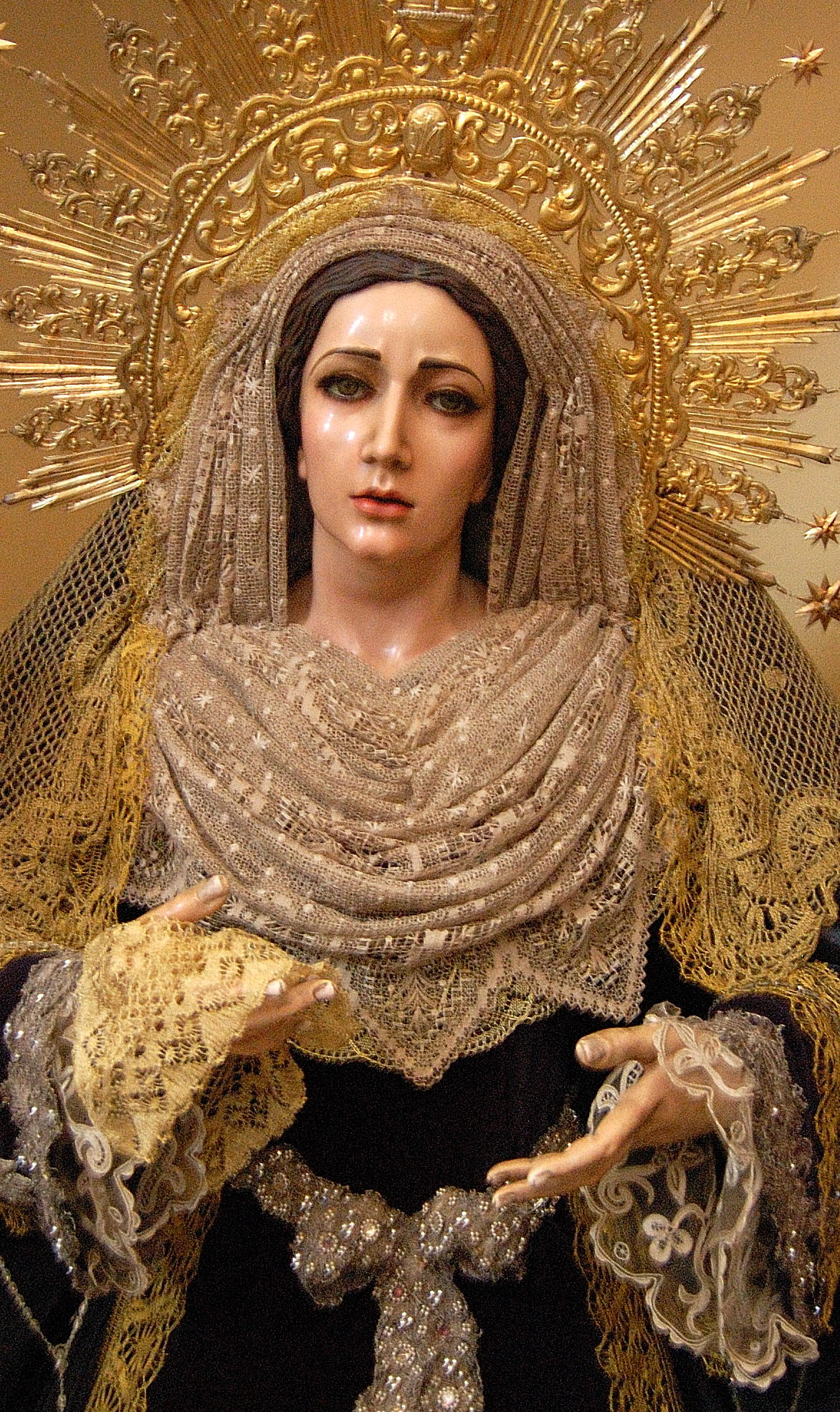 Maria Santisima de la Salud en su altar de cultos parroquial.